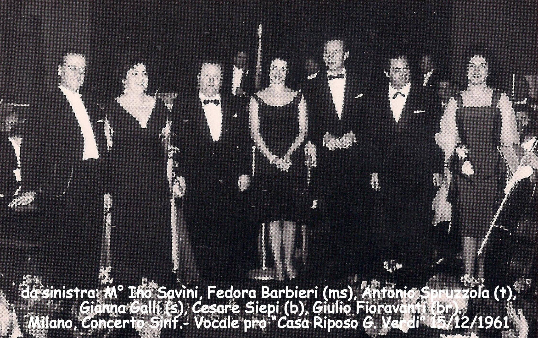 M° Ino Savini con cantanti liriciː Fedora Barbieri (ms), Antonio Spruzzola (t), Gianna Galli (s), Cesare Siepi (b), Giulio Fioravanti (br) per Concerto Sinfonico-Vocale pro "Casa di Riposo per Musicisti G. Verdi", Milano - Teatro Nuovo 15 Dicembre 1961